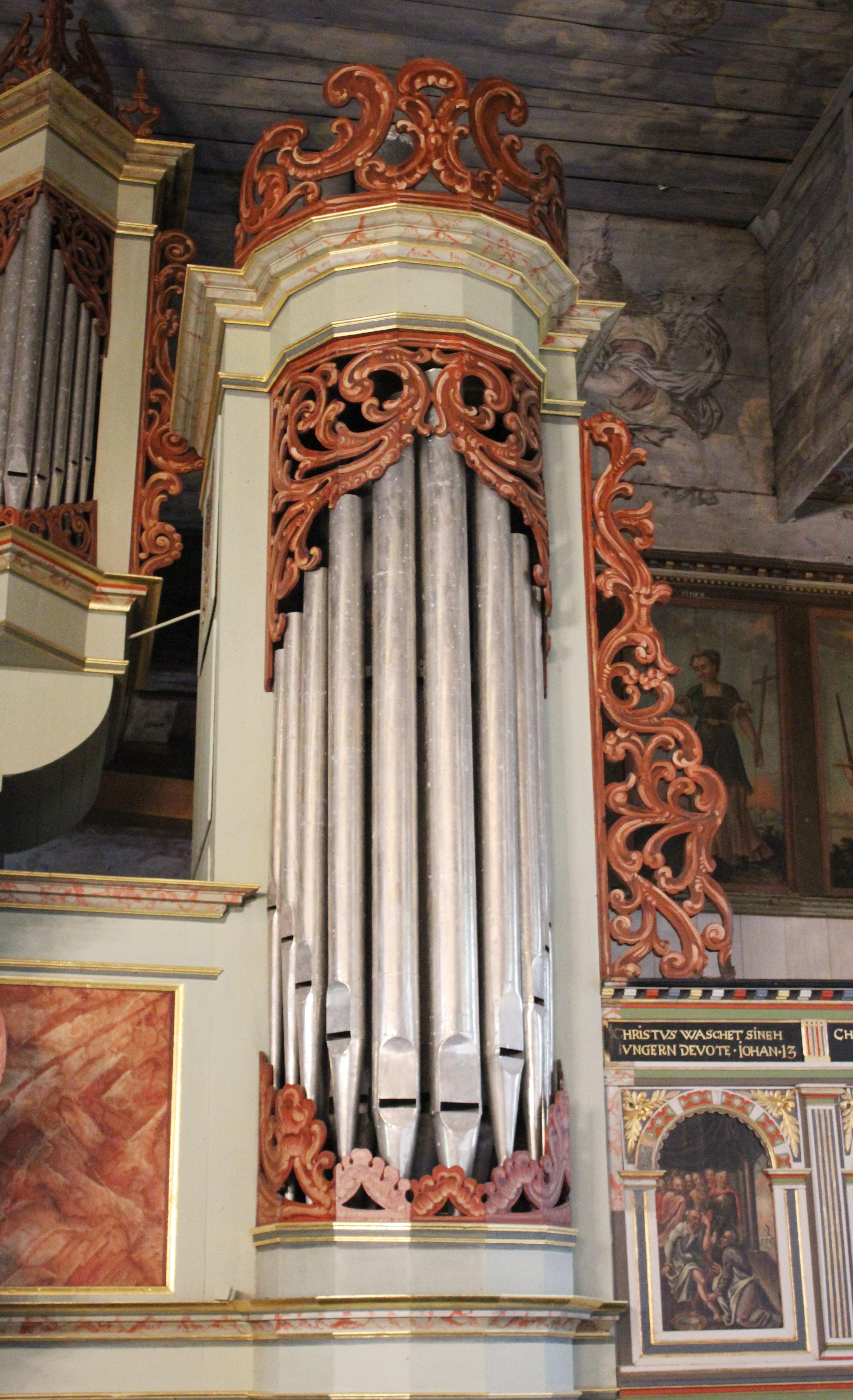 Orgel der St.-Jacobi-Kkirche Lüdingworth, Cuxhaven, Niedersachsen, Deutschland